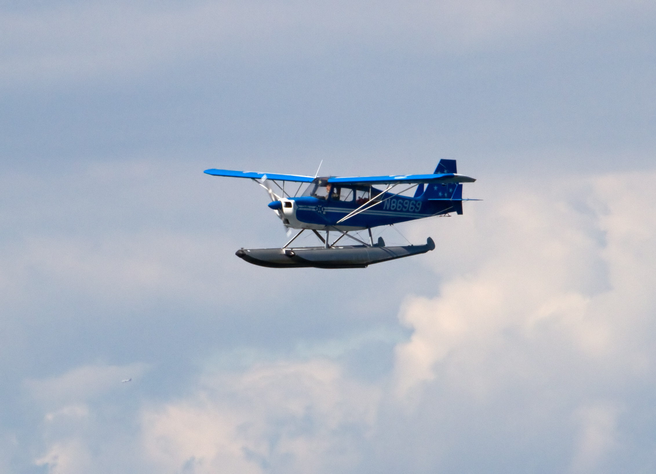 Bellanca 7GCBC N86969